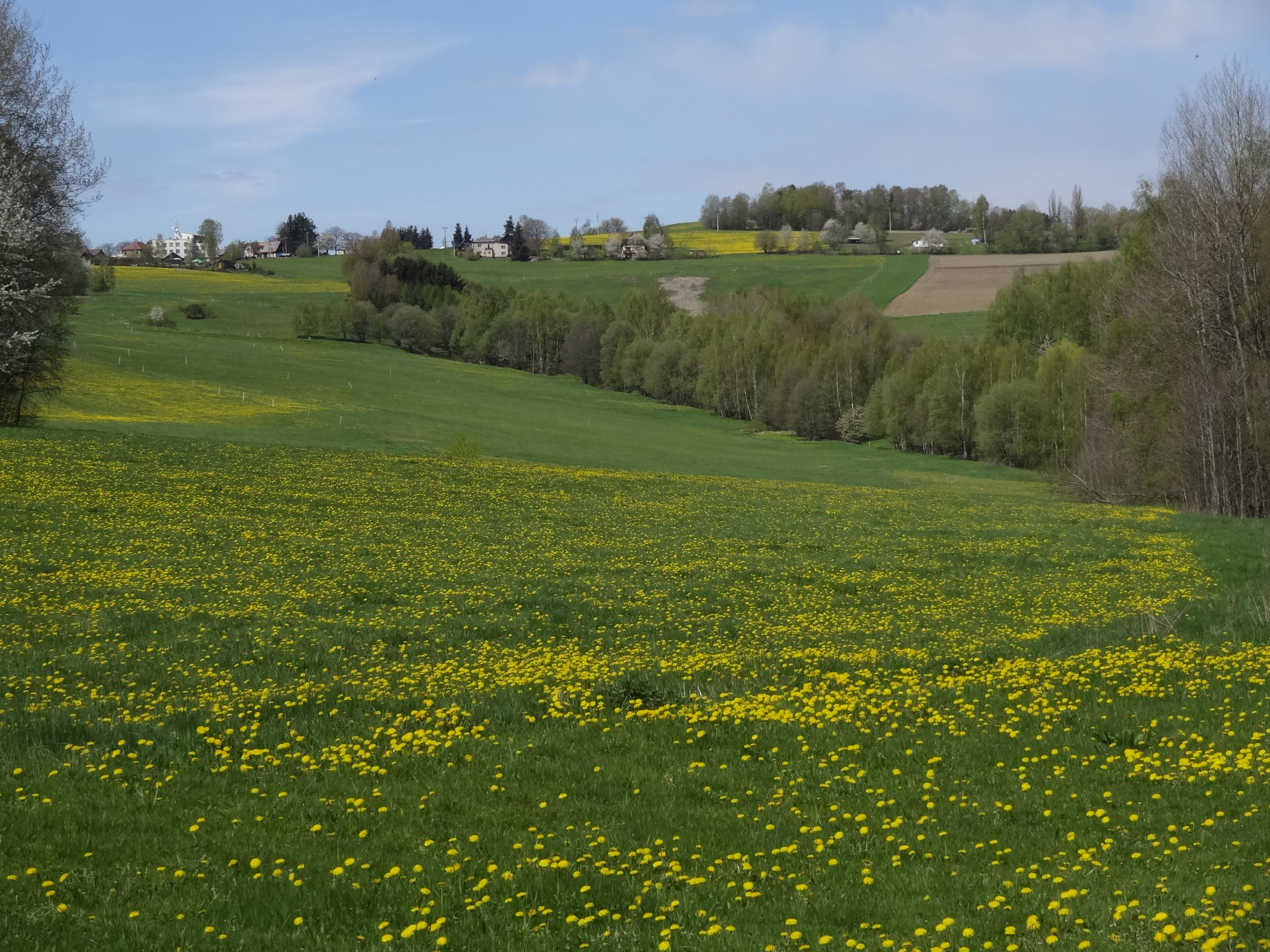 Jílové u Držkova - severní část vsi, pohled ze silnice Klepanda-Vlastiboř